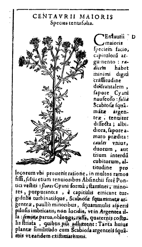 Centaurea paniculata como Centaurii maioris, lectotipo del género Centaurea escogido por Greuter & alt. en 2001 (Greuter , W. & al., Proposal to conseve the name Centaurea (Compositae) with a conseved type, Taxon, 50, p. 1201-1205, 2001) como especie tipo del género Centaurea en sustitución de Centaurea centaurium que ha sido incorporada a otro género, Rhaponticoides